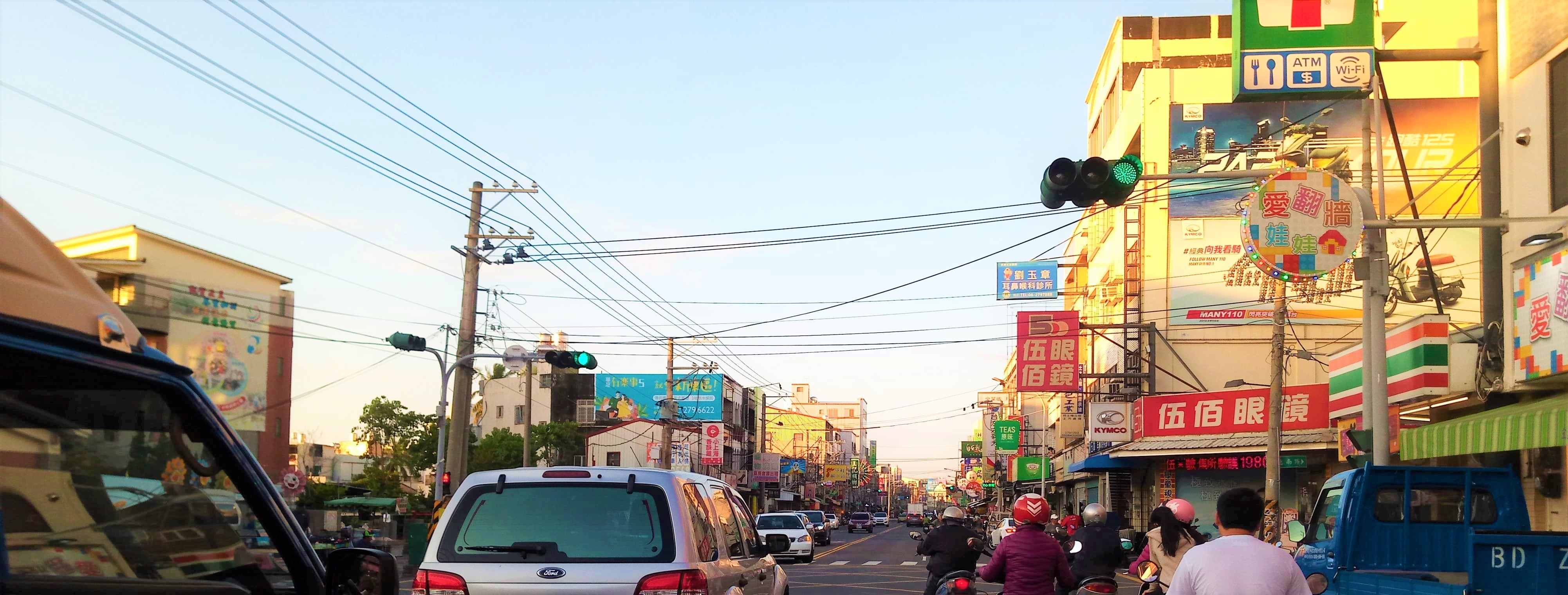 後壁厝市區-德南國小T字路口